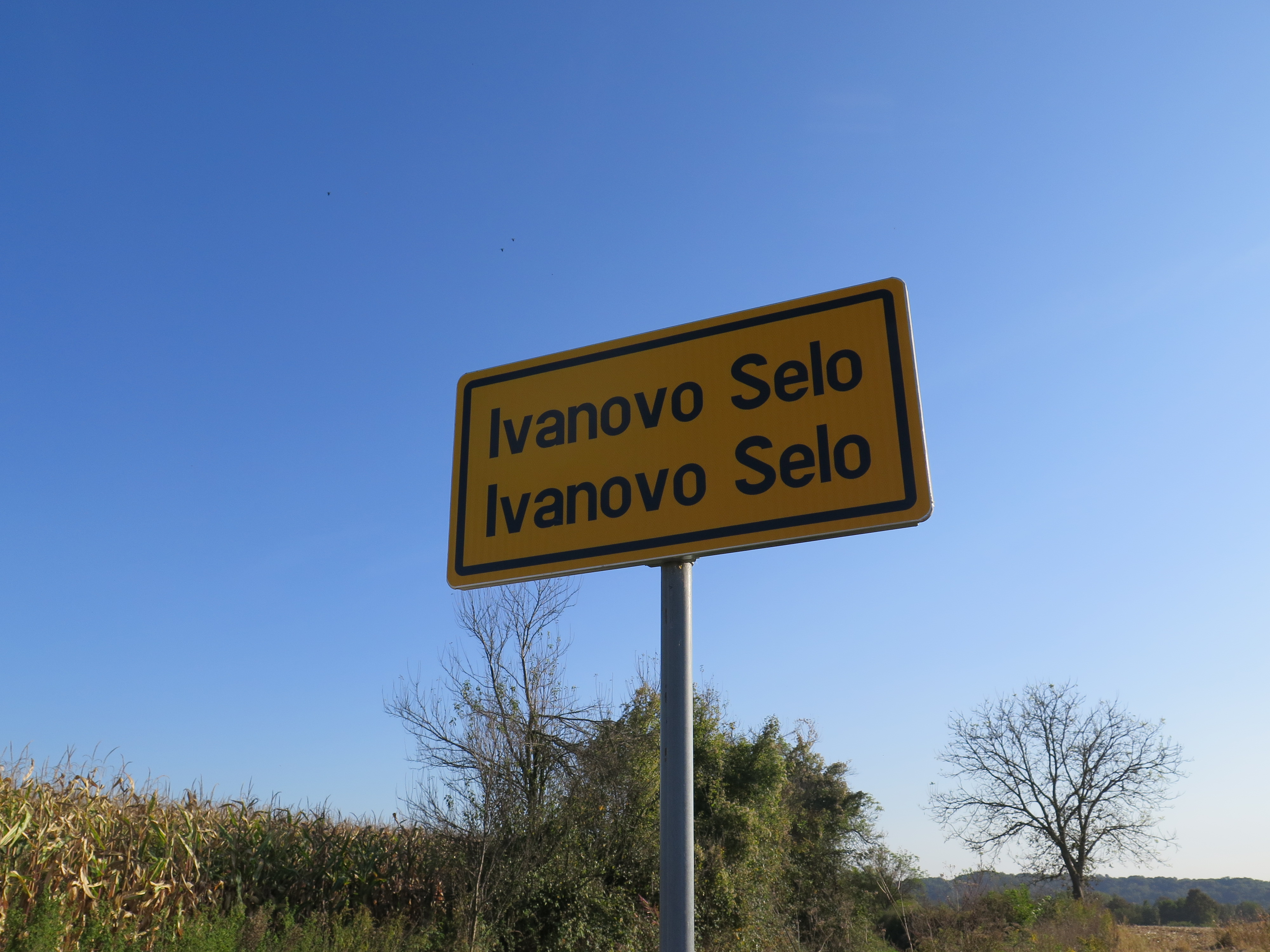 Dvojjazyčná tabule Ivanovo Selo